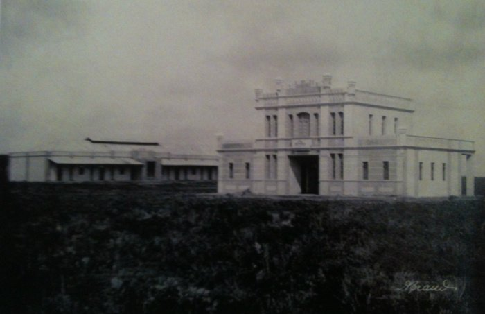 Castelinho - Obra da CIA. Mate Laranjeira, a mesma foi destinada para ser o quartel do corpo Militar de Polícia, que nestes tempos utilizava cavalos.